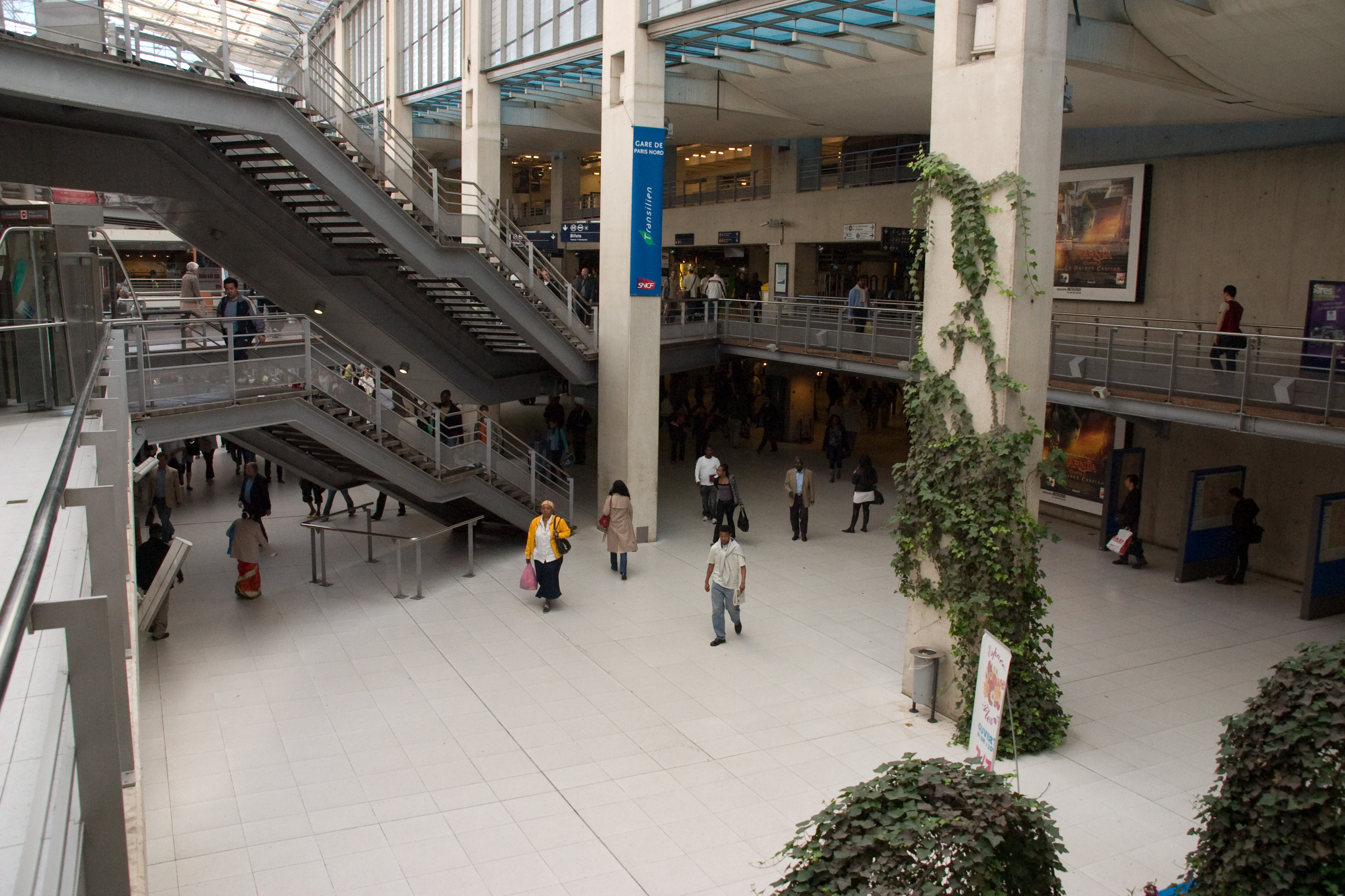 Gare du Nord, Paris, France